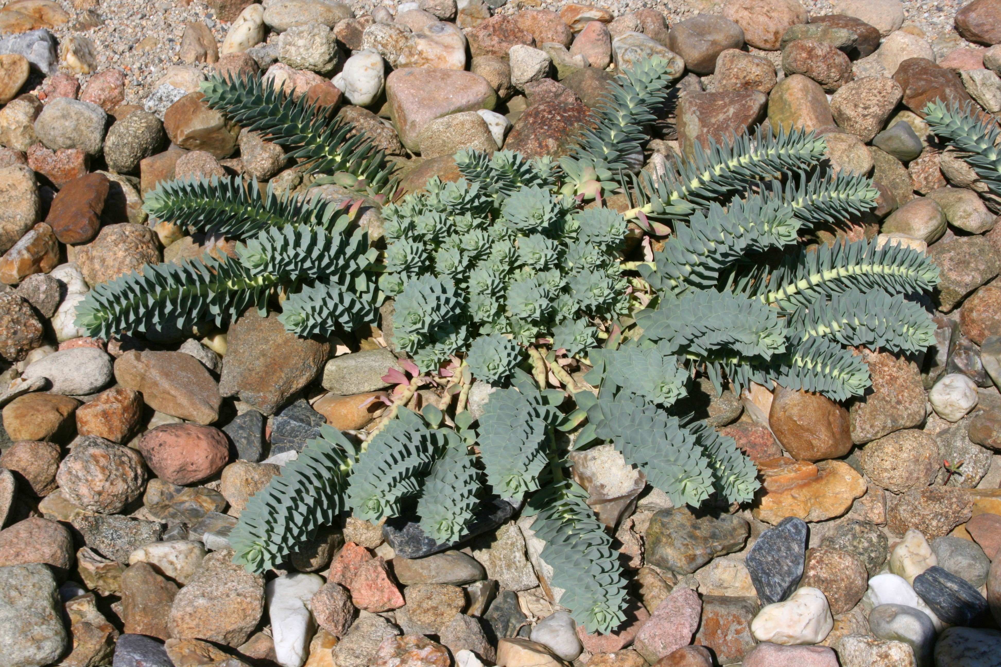 Findlingspark Nochten in Boxberg/O.L.-Nochten